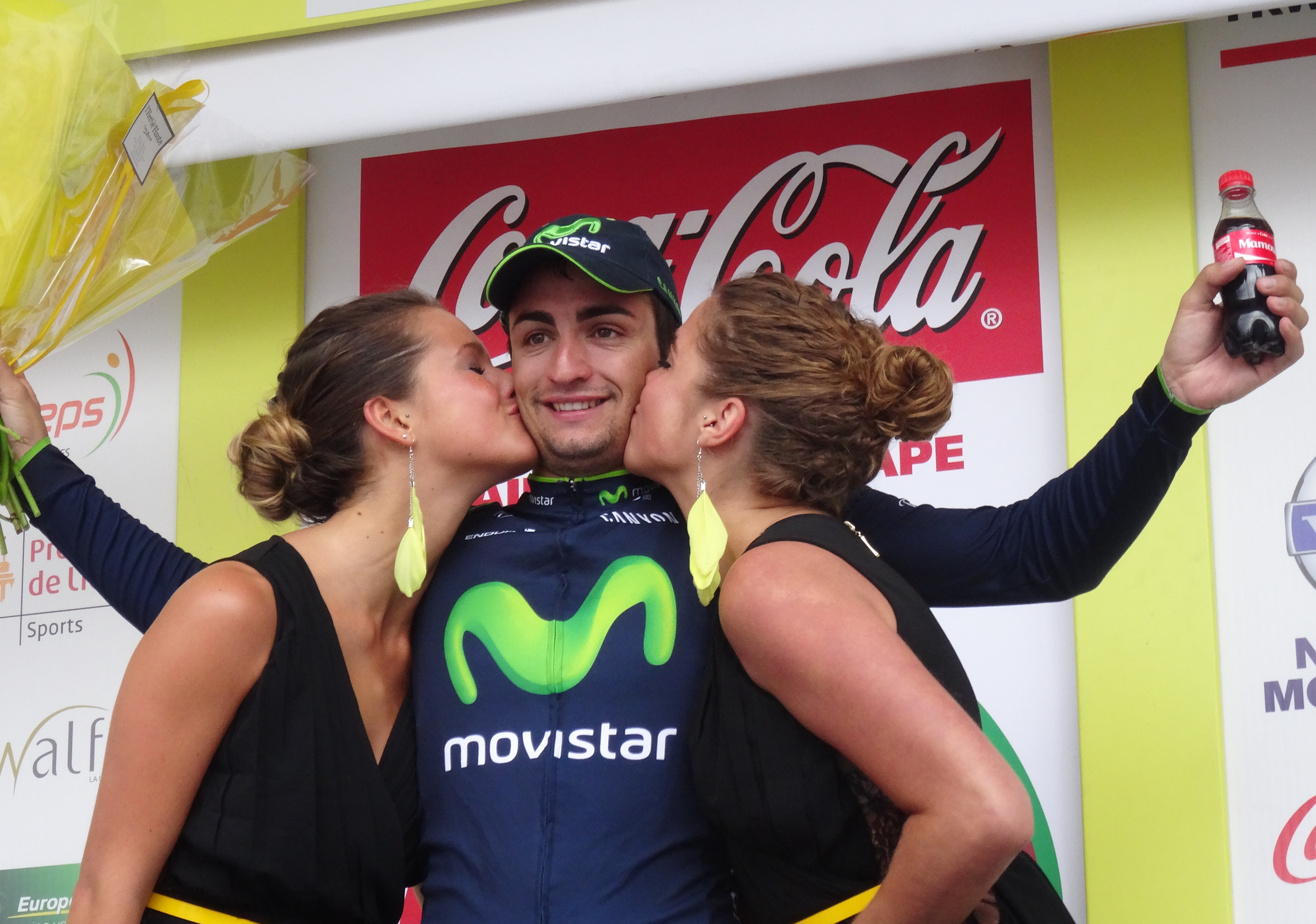 Reportage photographique réalisé le lundi 28 juillet à l'occasion de l'arrivée de la troisième étape du Tour de Wallonie 2014 à Neufchâteau, Belgique.